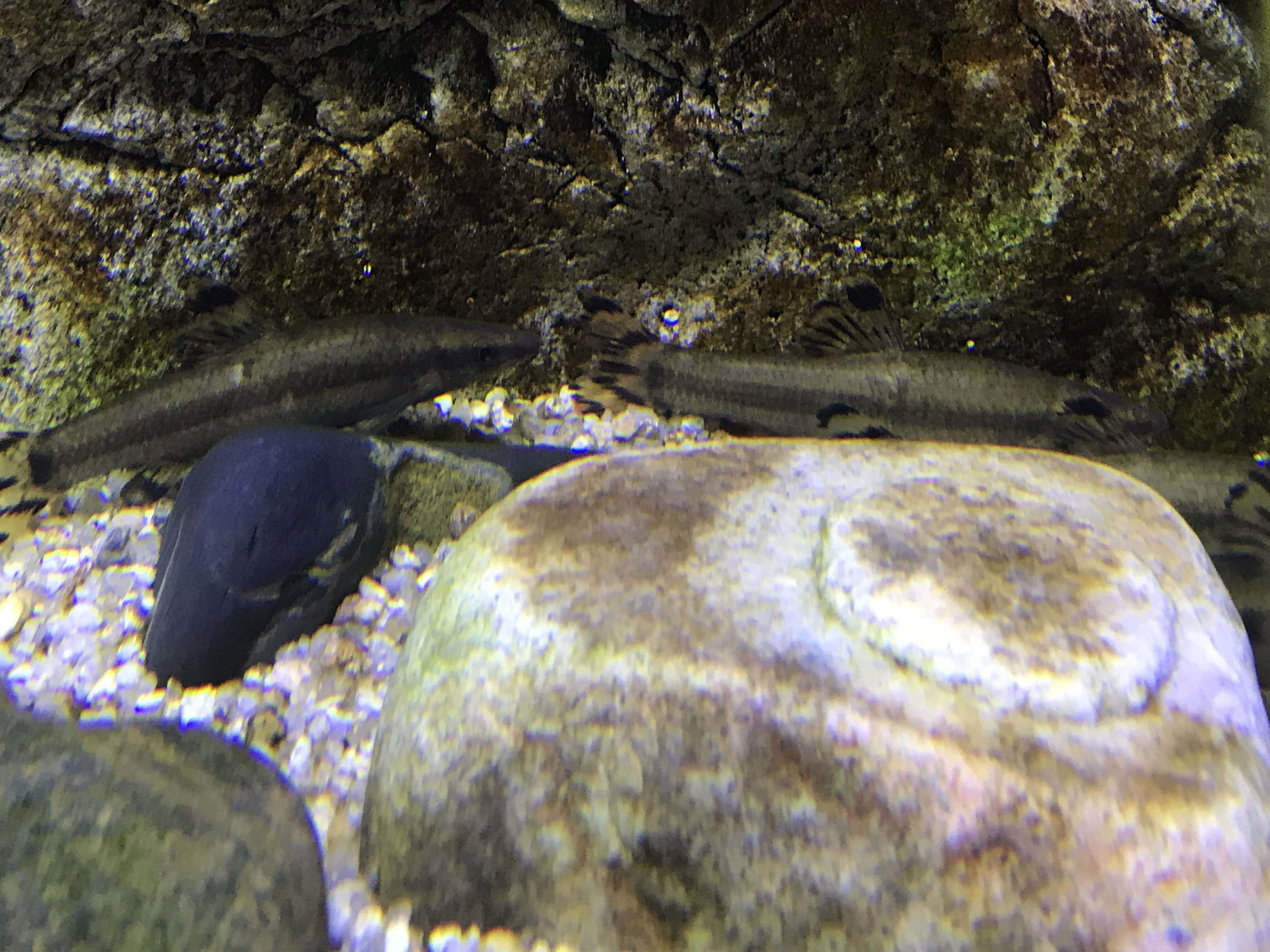 Pseudopungtungia nigra(감돌고기), 단양 다누리아쿠아리움